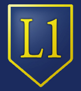 insignia del Liceo N°1 Javiera Carrera Año de fundación: 1894 Localización Santiago, Chile Lema: "Formar mujeres íntegras capaces de ingresar a la educación superior enfrentando a una sociedad en constante cambio" Género:Femenino Proceso de selección: Sí Horario escolar: Doble jornada Afiliación religiosa: Laico Directora: Julia Alvarado Thimeos